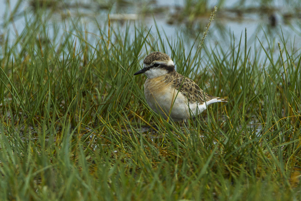 Kittlitz's Plover - Mara - Kenya_S4E9279